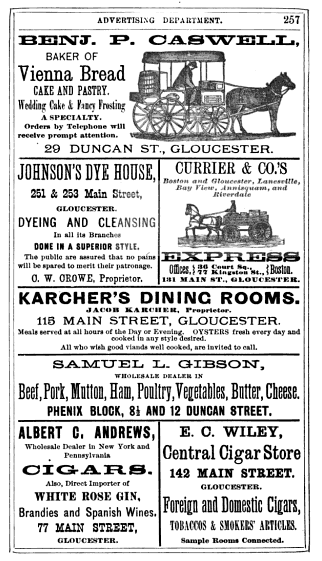 Advertisements, Gloucester, Massachusetts, USA